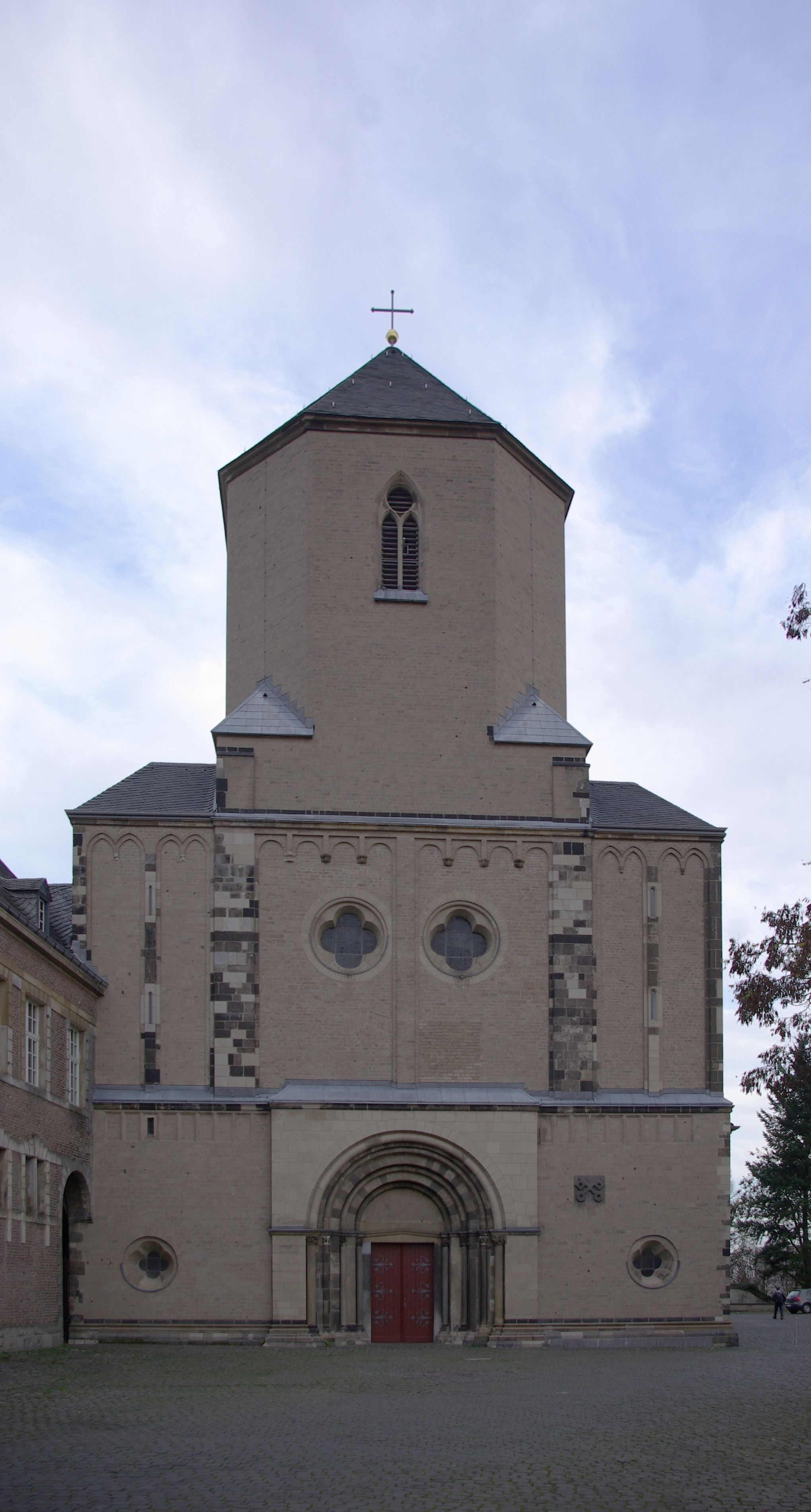 Mönchengladbach, der Mönchengladbacher Münster. Es ist eine katholische Kirche, erbaut ab dem Jahre 974.